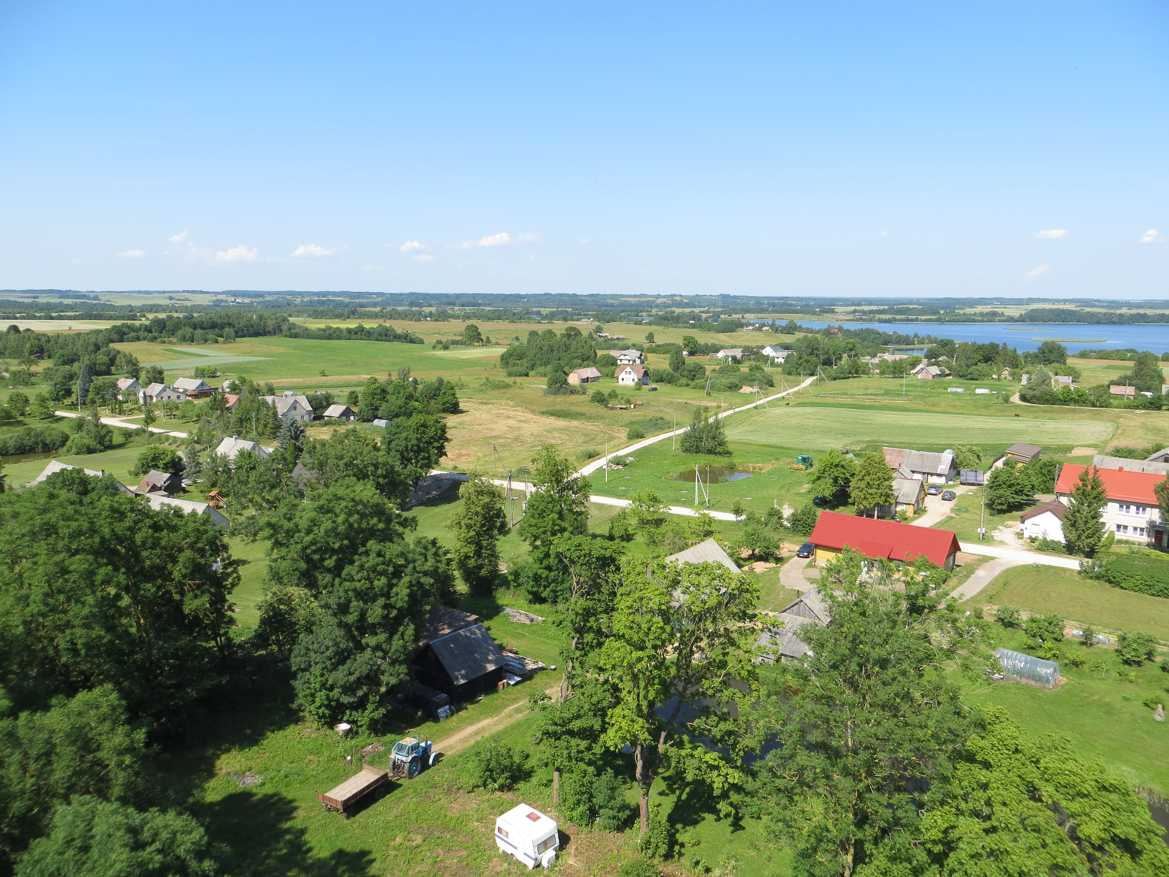 Martnonys, Lithuania